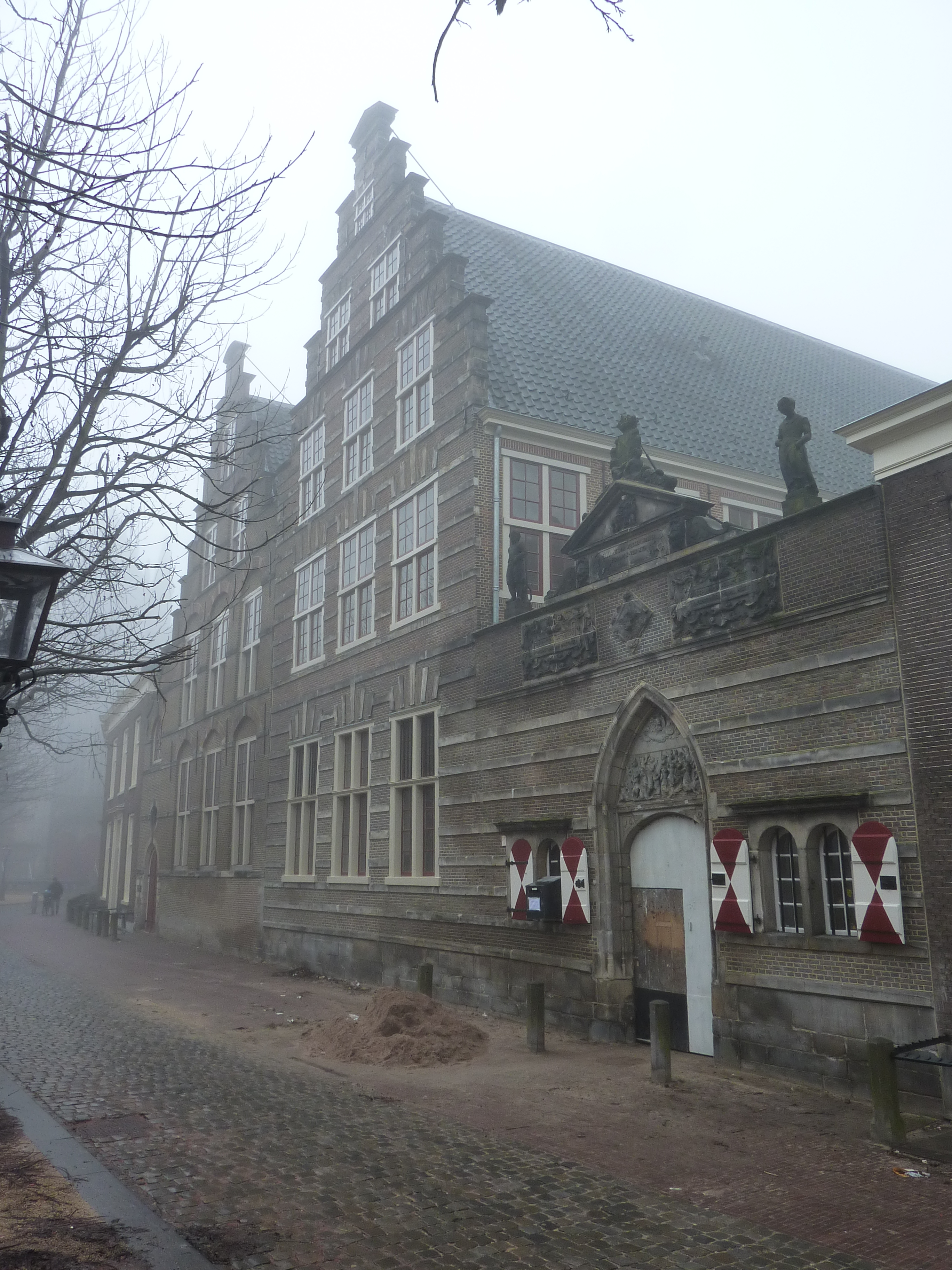 Leiden, Hooglandse kerkgracht